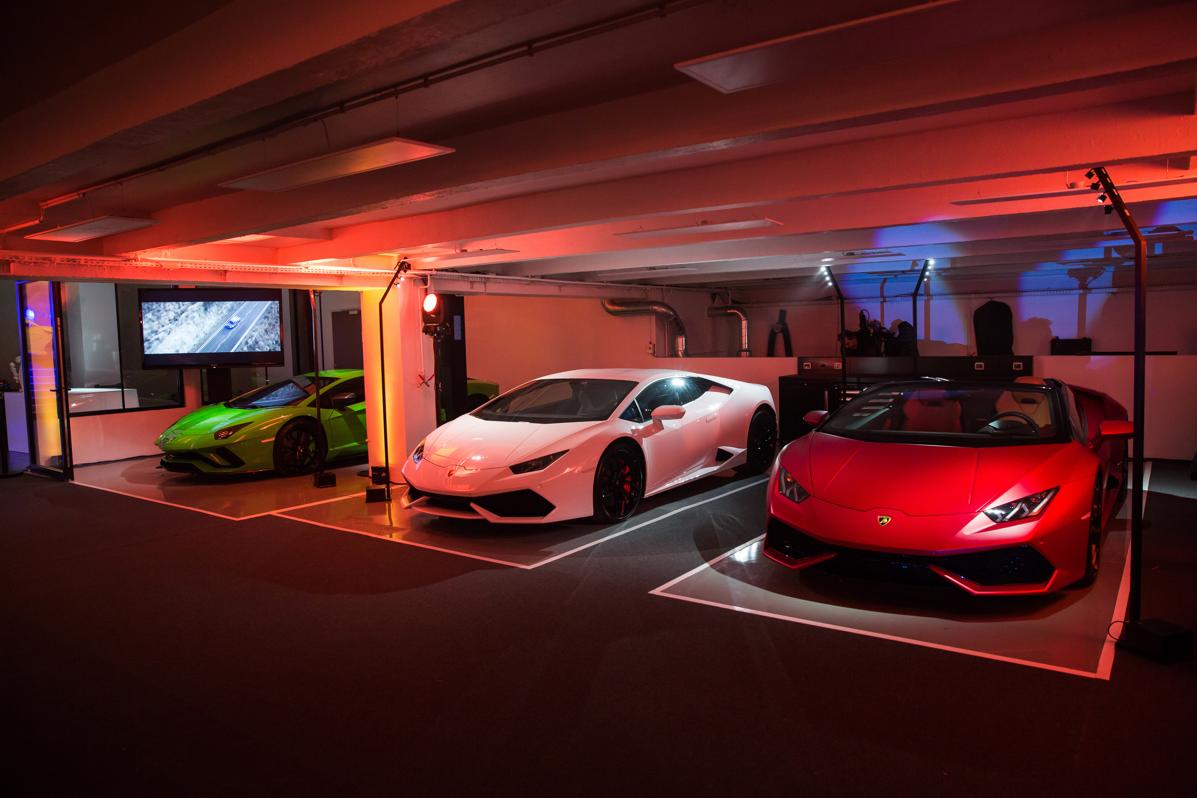 Soirée de présentation de l'URSS Lamborghini